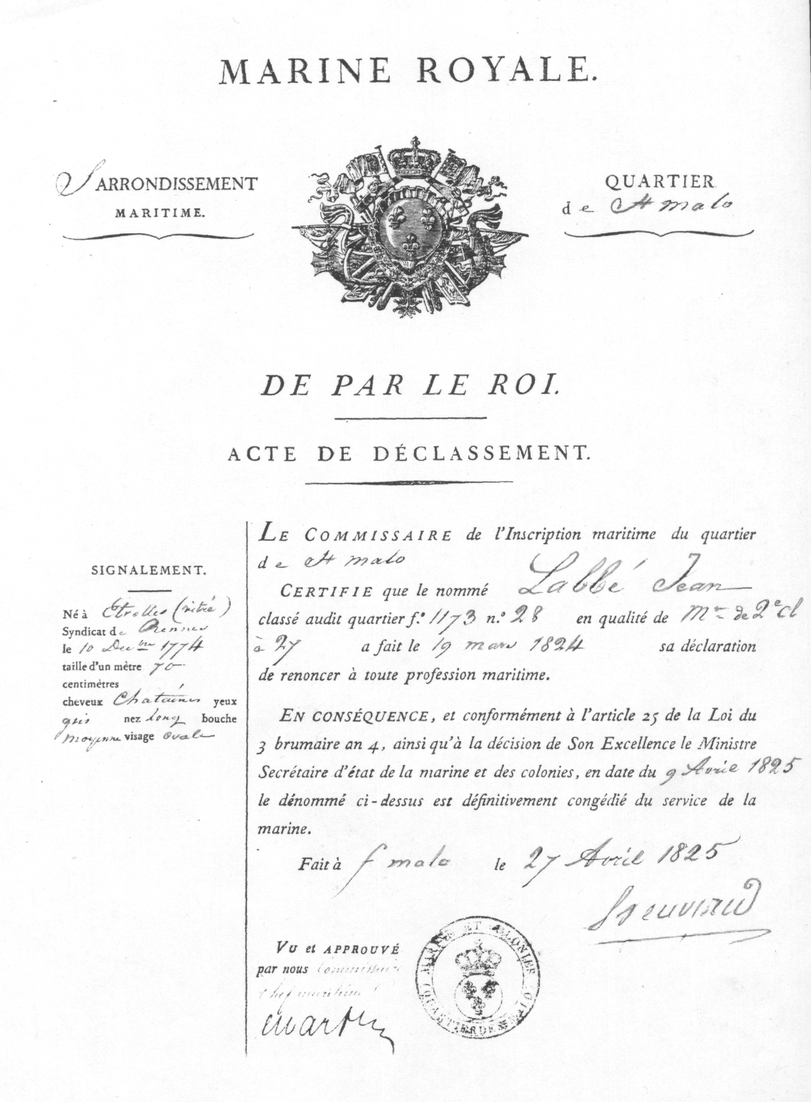 Attestation du renoncement d'un matelot à la navigation ; il n'est plus inscrit maritime du quartier de Saint-Malo, ni d'aucun autre en principe. 1825.